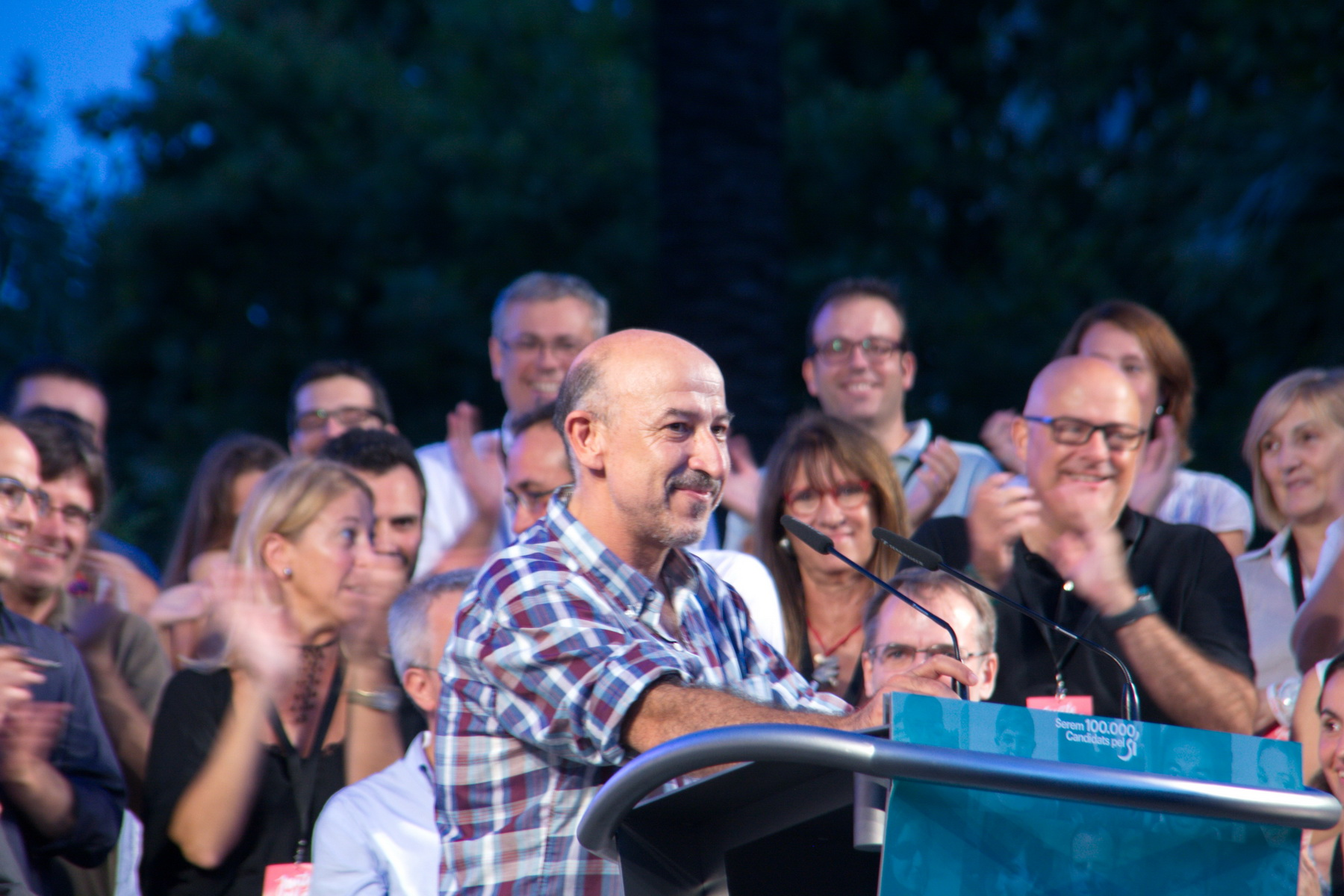 Germà Bel a l'acte de presentació de tots els candidats de la llista Junts pel Sí a Barcelona, al Psg.Lluís Companys. (28-8-2015)